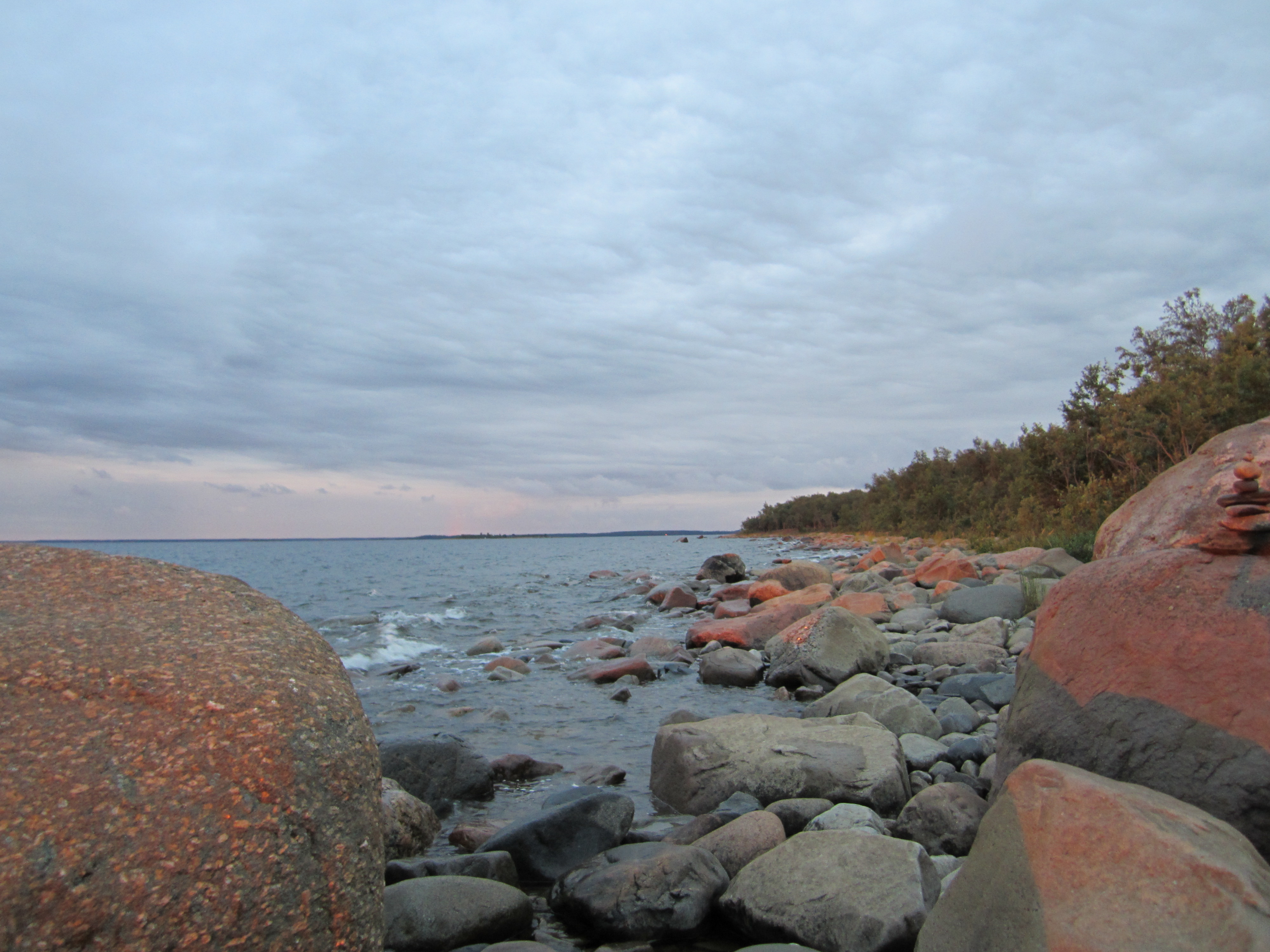 Ohtakarin kivikkoista rantaa